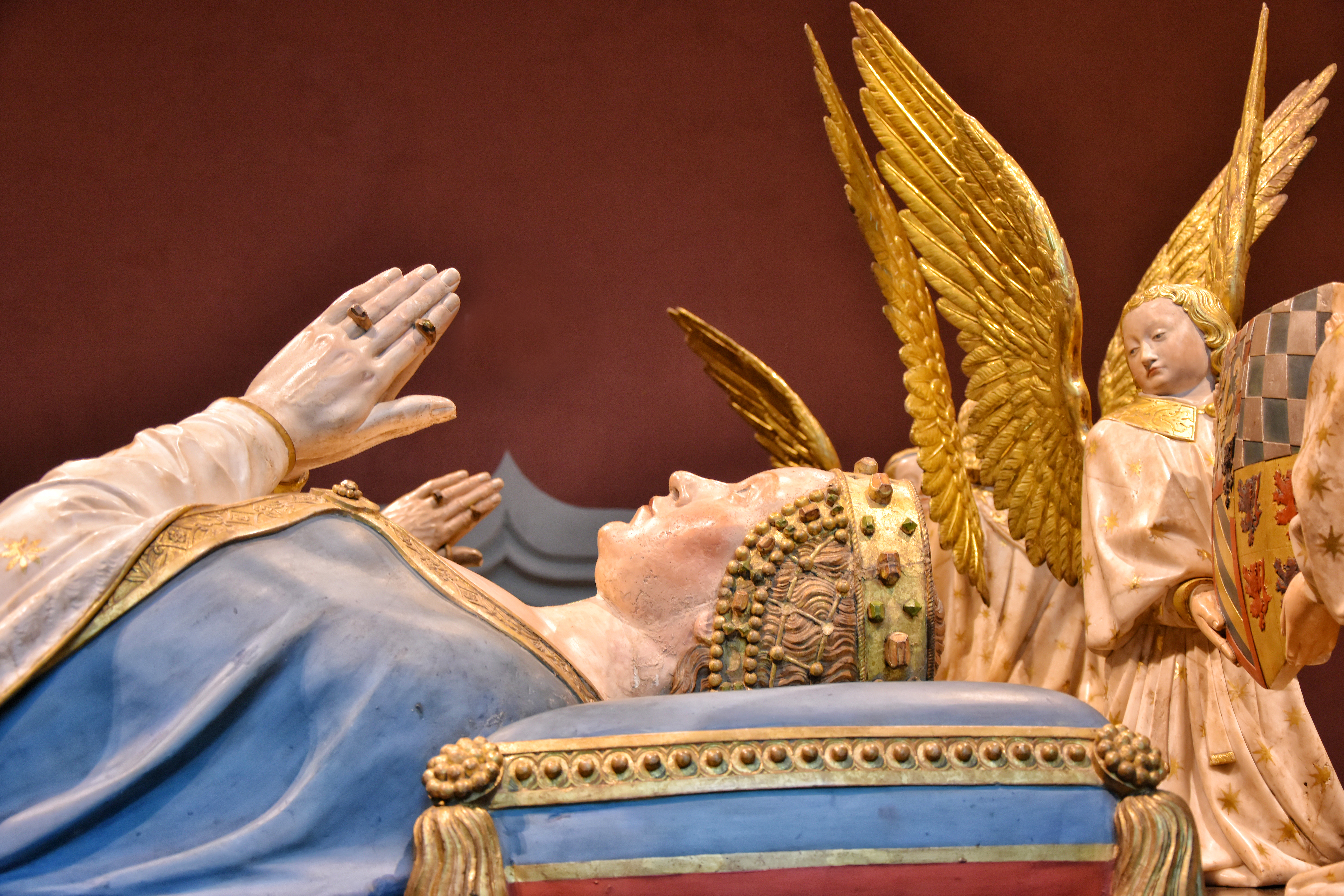 Musée des Beaux-Arts de Dijon Praalgraf Margaretha van Beieren (1363-1423)